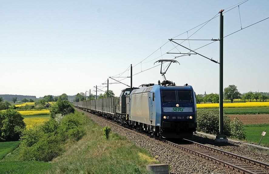 Leerer Holzzug aus Horb-Heiligenfeld auf der Gäubahn Eutingen—Freudenstadt